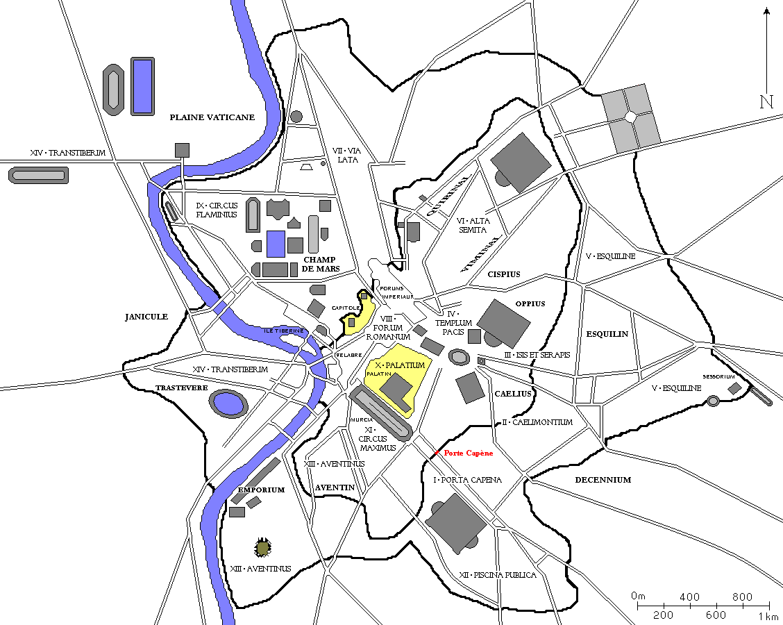 Plan de Rome avec la porte Capène en rouge.